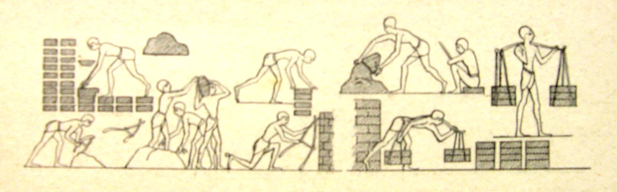 Fabrication de briques (anciens égyptiens